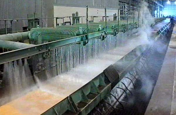 Meleg szélesszalagsor hűtőszakasza